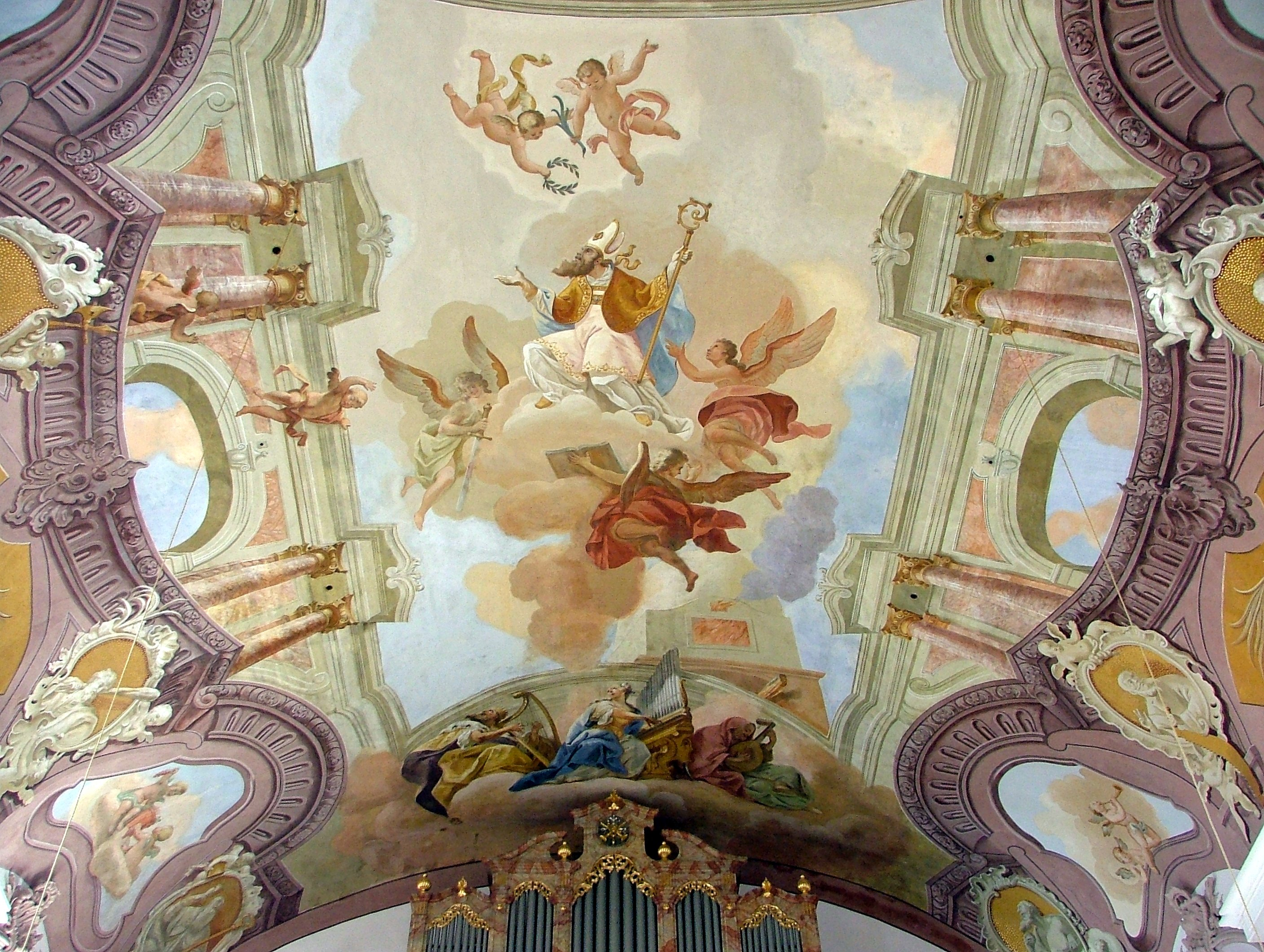 Stöttwang